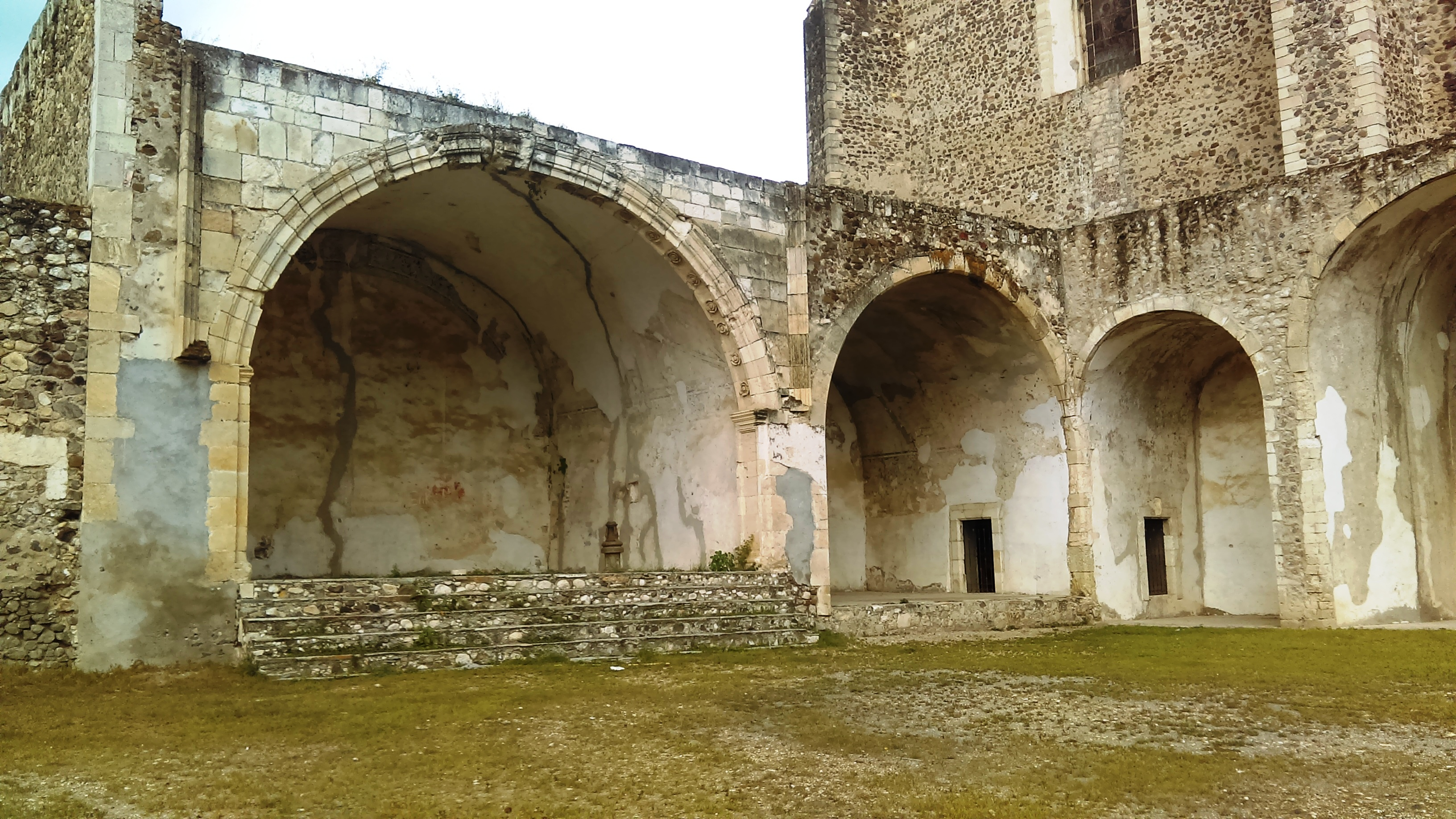 Templo y exconvento de los Santos Reyes, Metztitlán.